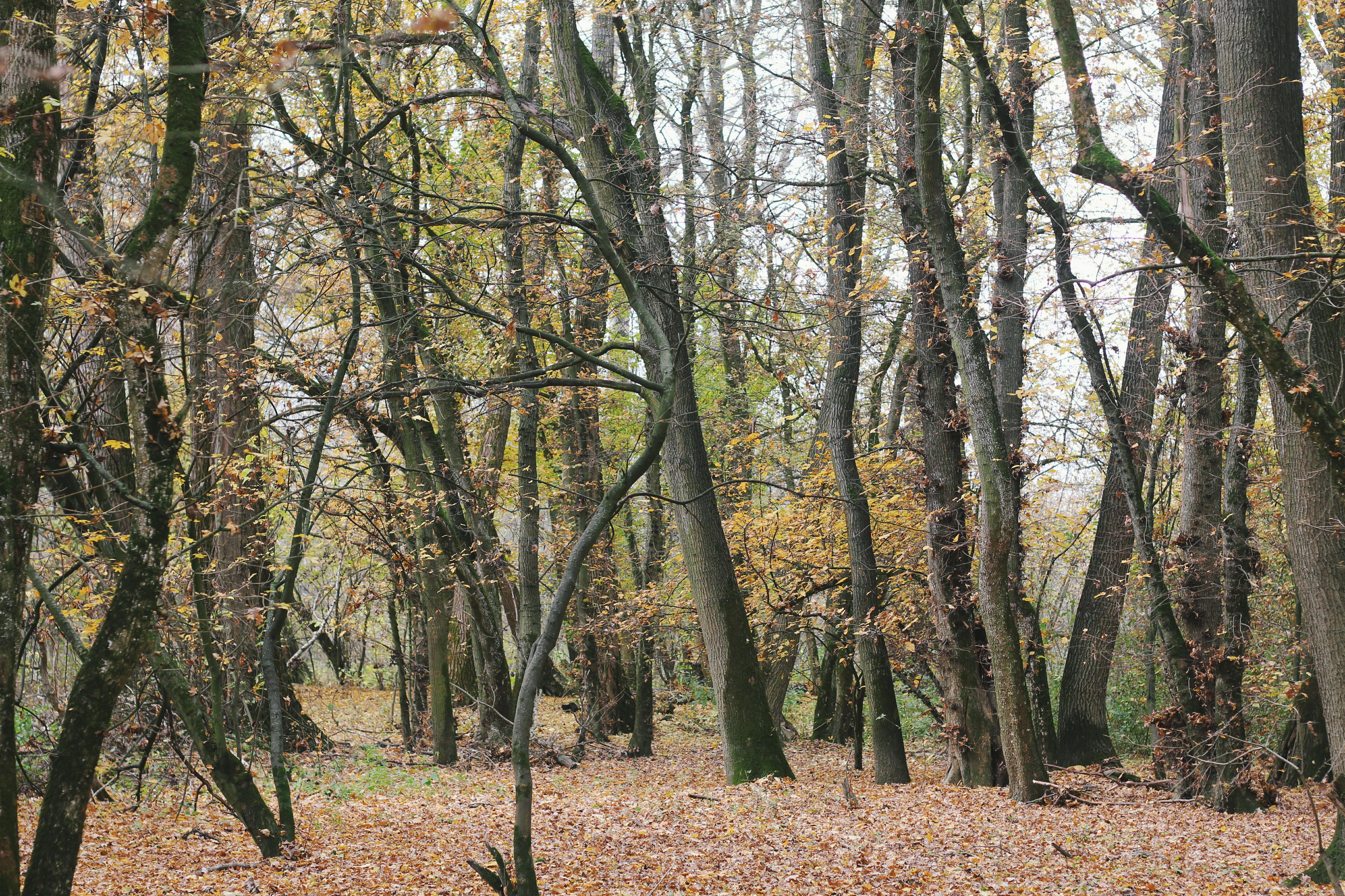 Raškovský luh